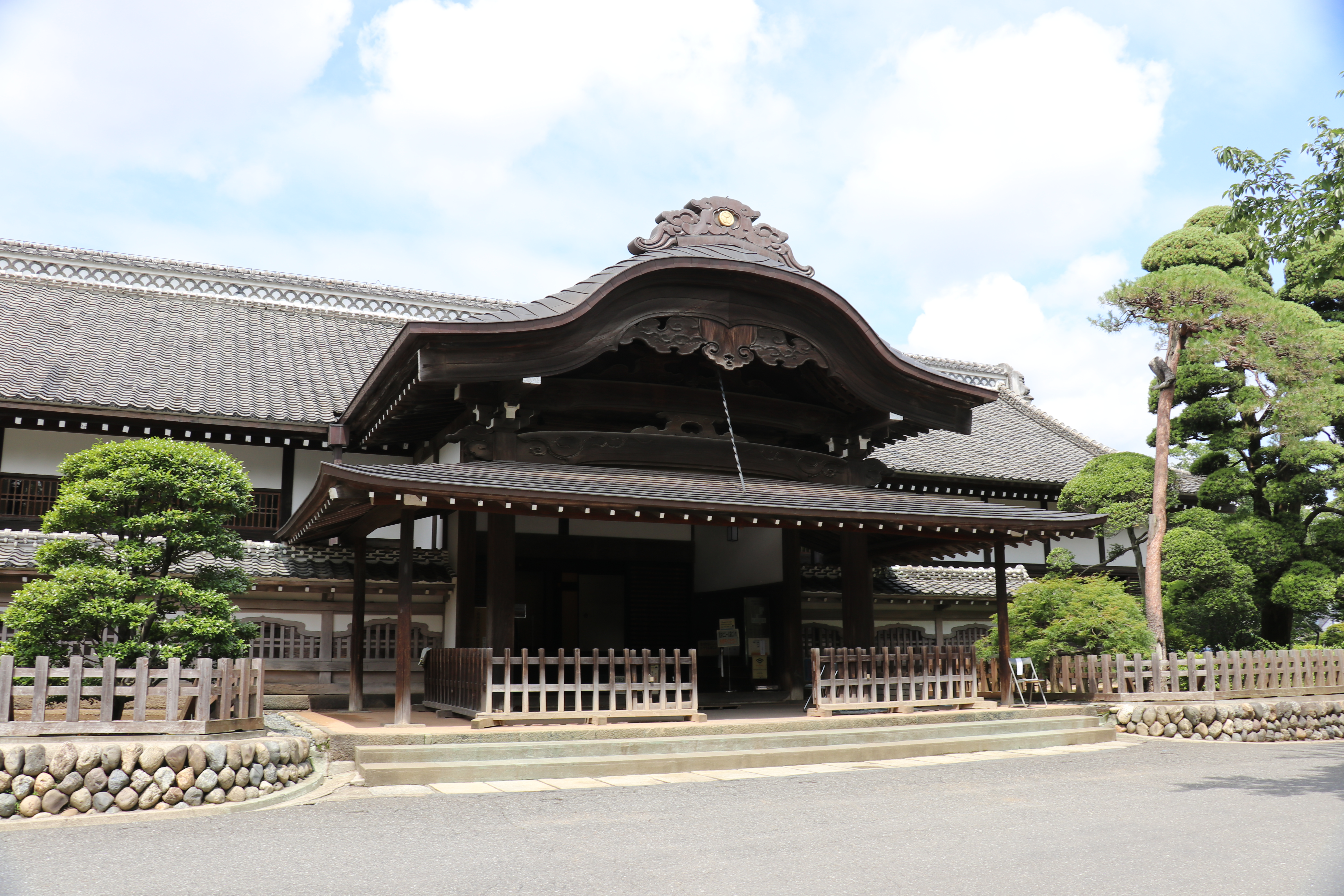 埼玉縣川越市川越城本丸御殿